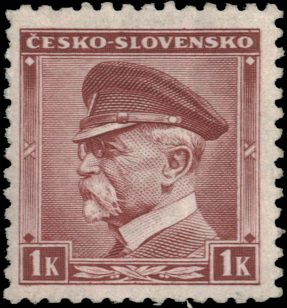 Почтовая марка Чехословакии с портретом первого президента Т. Г. Масарика